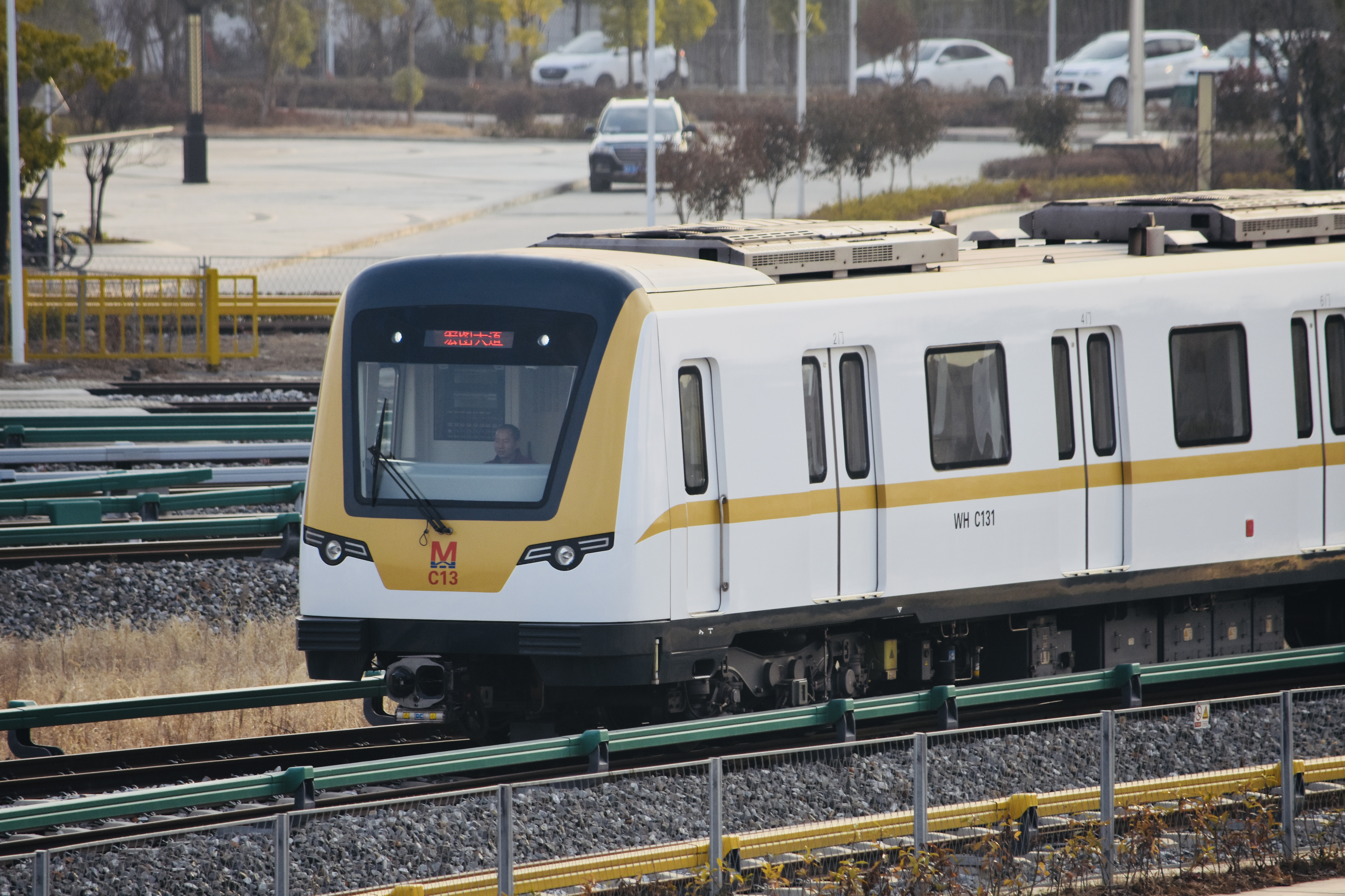 武汉轨道交通3号线列车，位于三金潭车辆段。